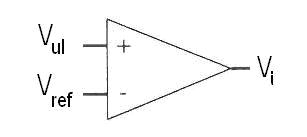 (Ja sam autor ove slike, koristim je za seminarski rad i predajem je u javno vlasništvo)